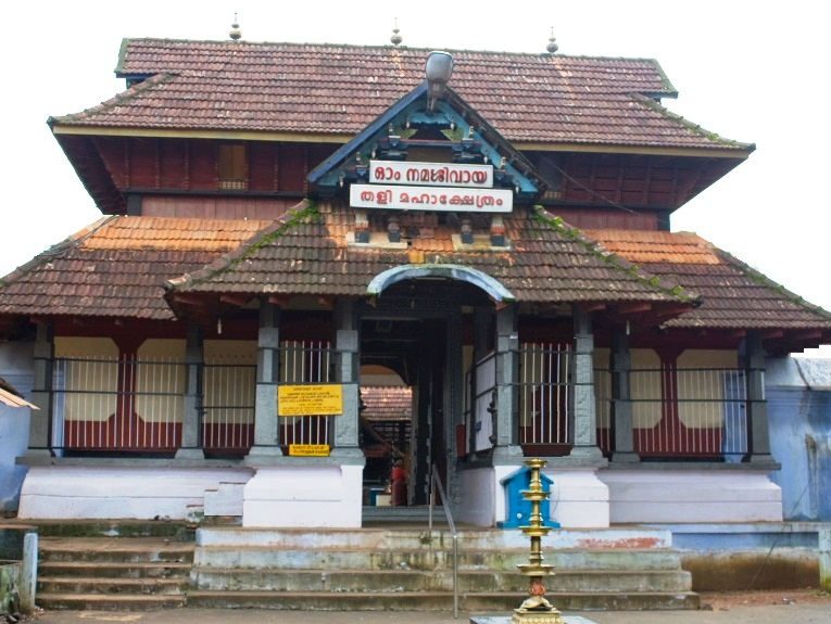 കോഴിക്കോട് തളിക്ഷേത്രം